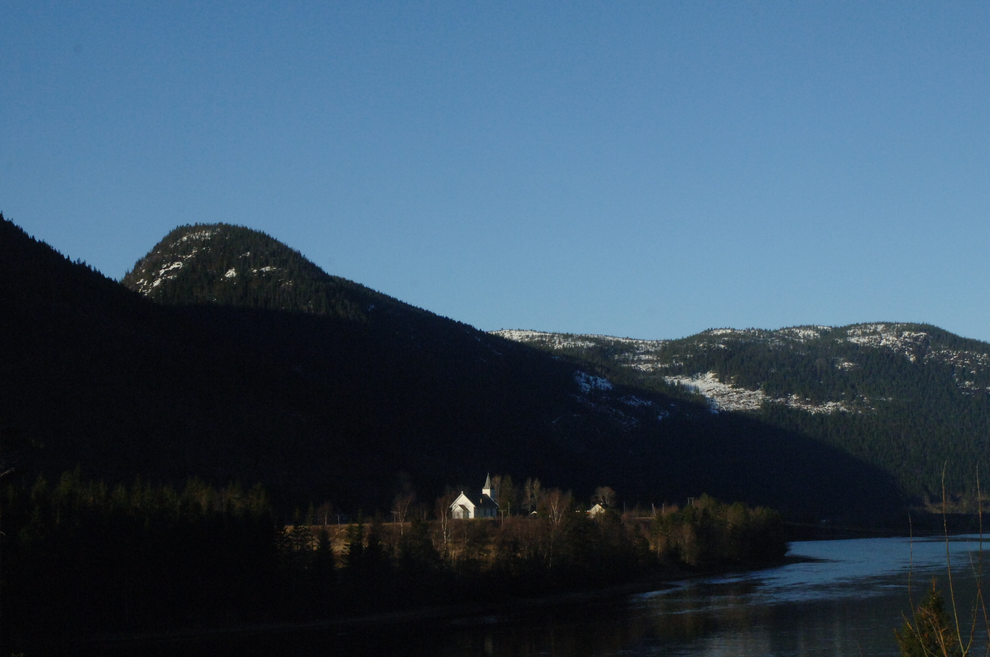 Austad kyrkje på Tveit i Bygland vist slik ho ligg i omgjevinga, sett frå andre sida av Otra.